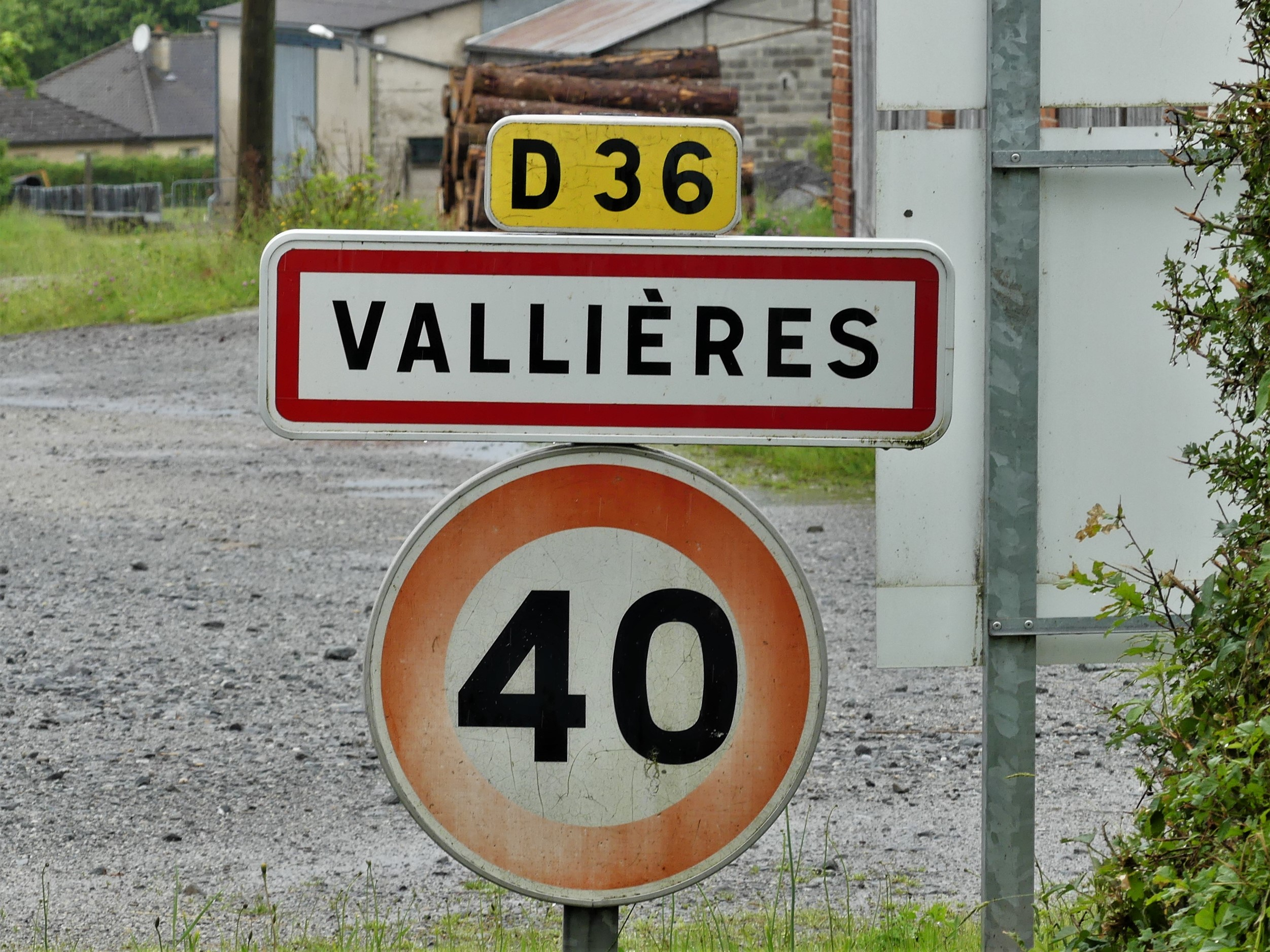 Panneau d'entrée au bourg de Vallière (avec l'orthographe d'avant 1996), Creuse France